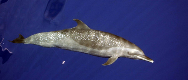 Stenella sp. Pantropical Spotted Dolphin = Category:Stenella attenuata